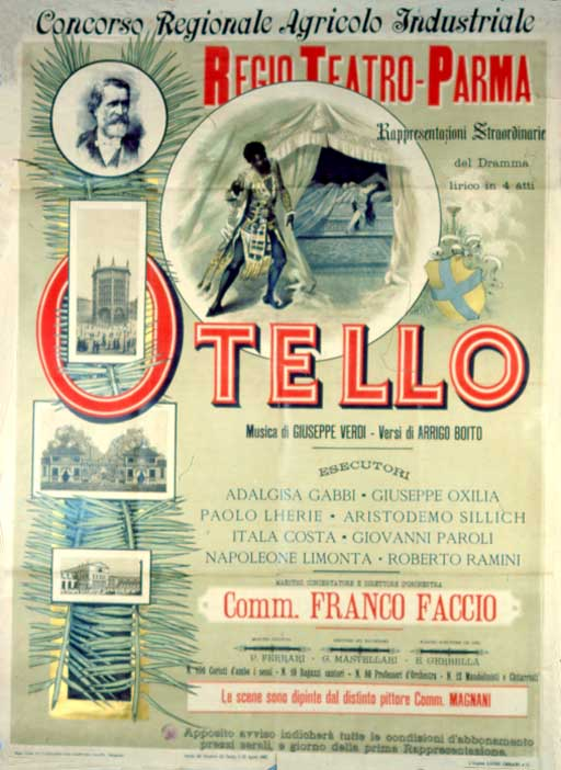 Афиша постановки в Парме